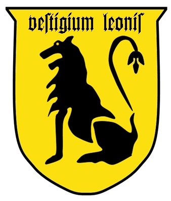 Wappenschild des Kampfgeschwaders 257 (später Kampfgeschwader 26) der Luftwaffe der deutschen Wehrmacht